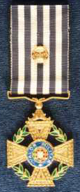 Medalha valor militar grau ouro